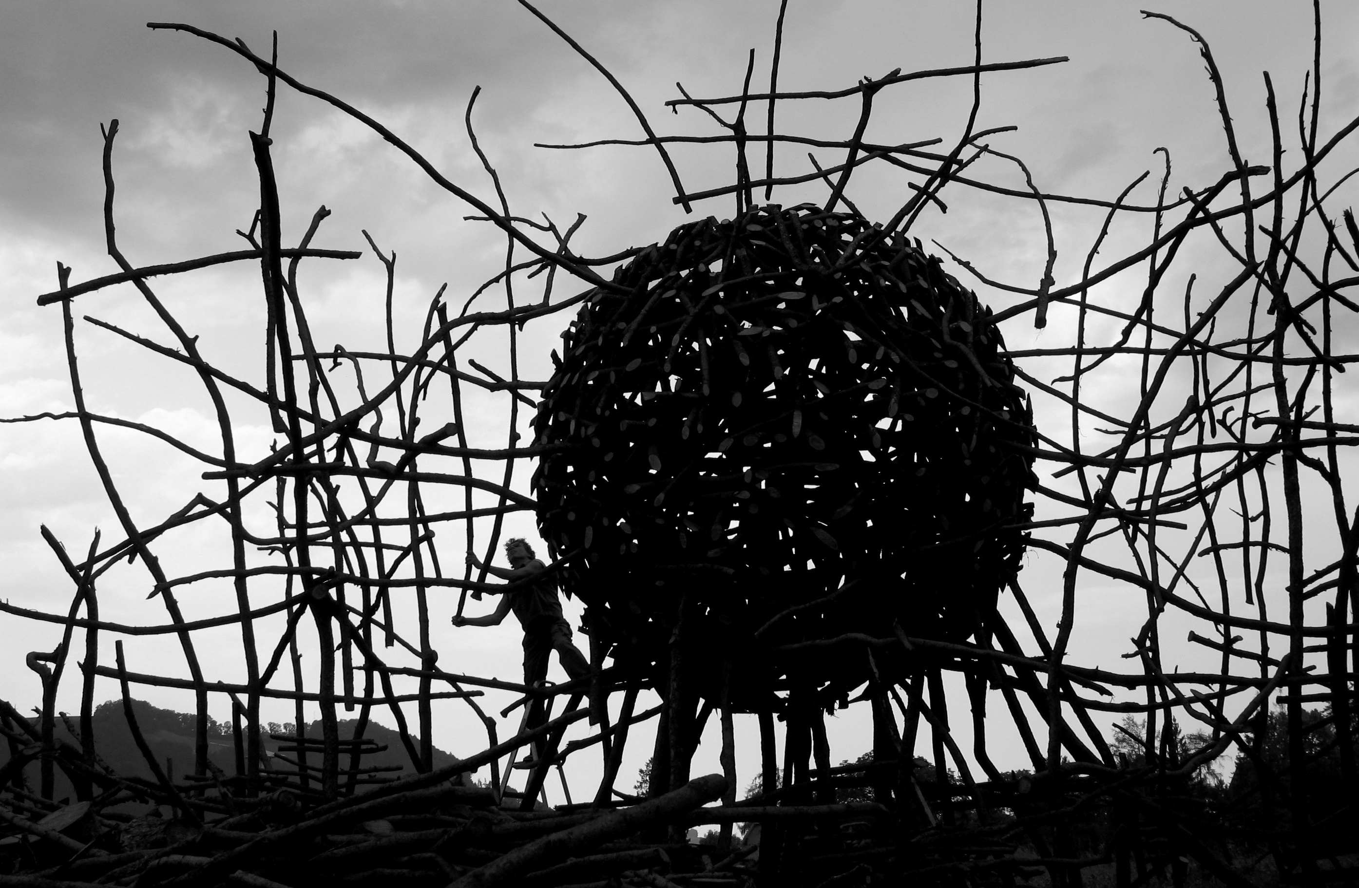 "Fichten-Kugel", CH-Münsingen, 2006